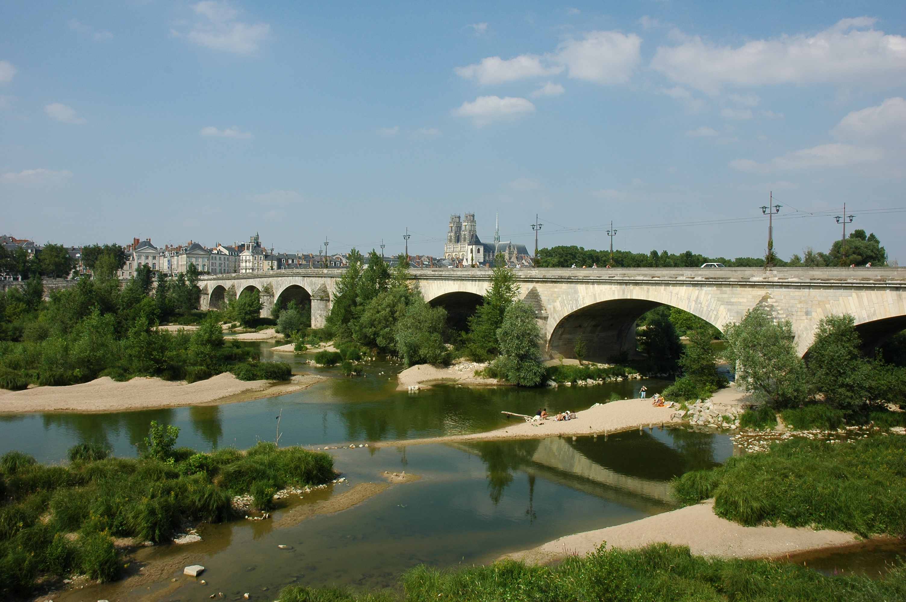 France Loiret Orléans Le pont George V avec la cathédrale en arrière plan Photographie prise par GIRAUD Patrick